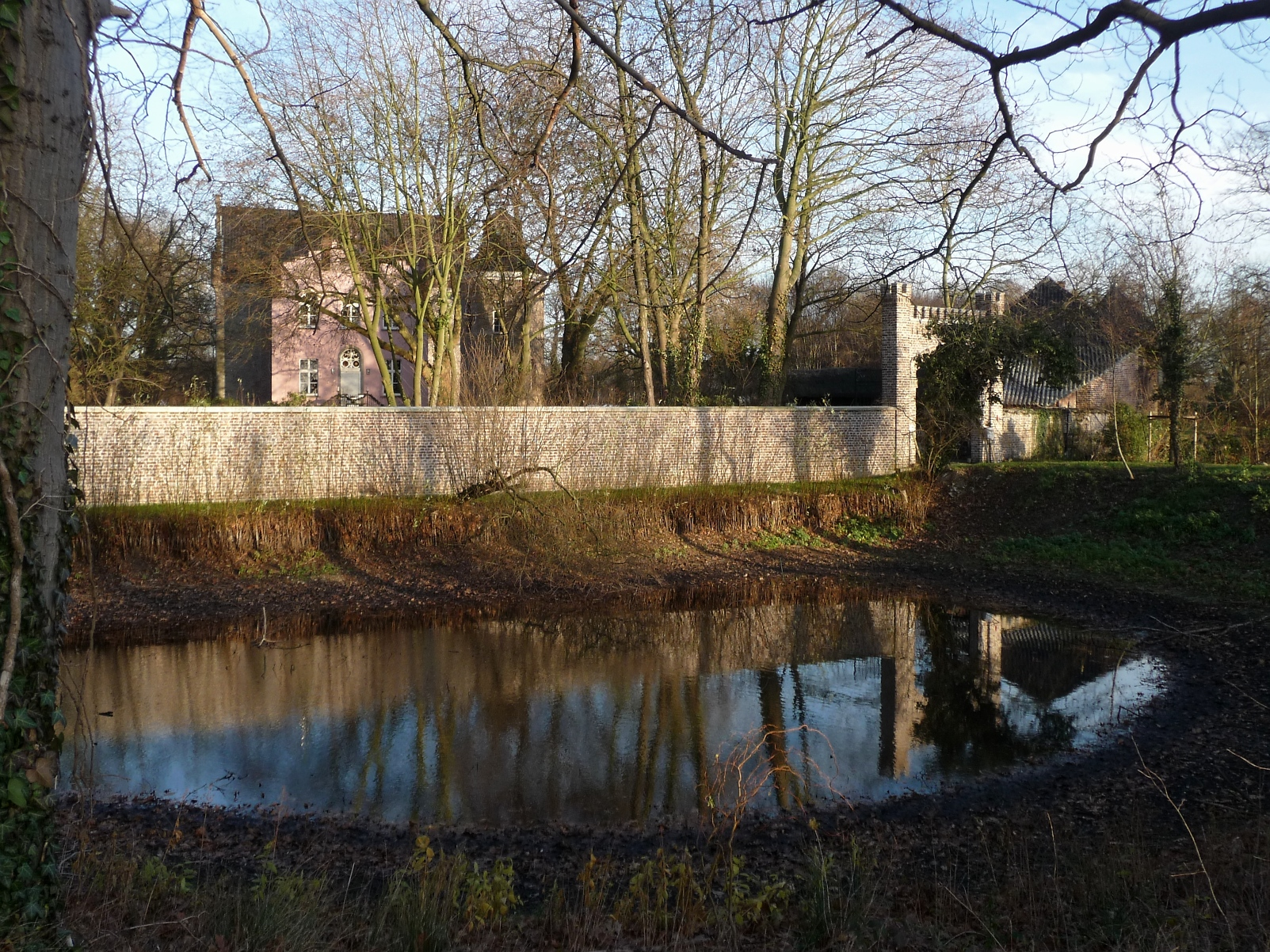 Denkmalliste Nr. 9, Haus Raedt, Vorst